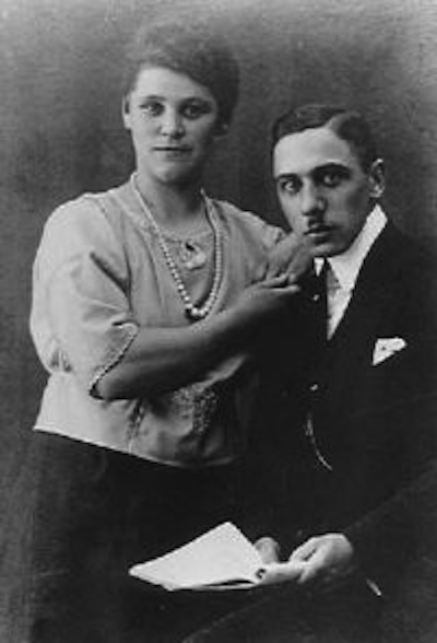 Nikolaus Groß mit Ehefrau Elisabeth, Tag der Verlobung (1912) aus: Archiv Bistum Essen